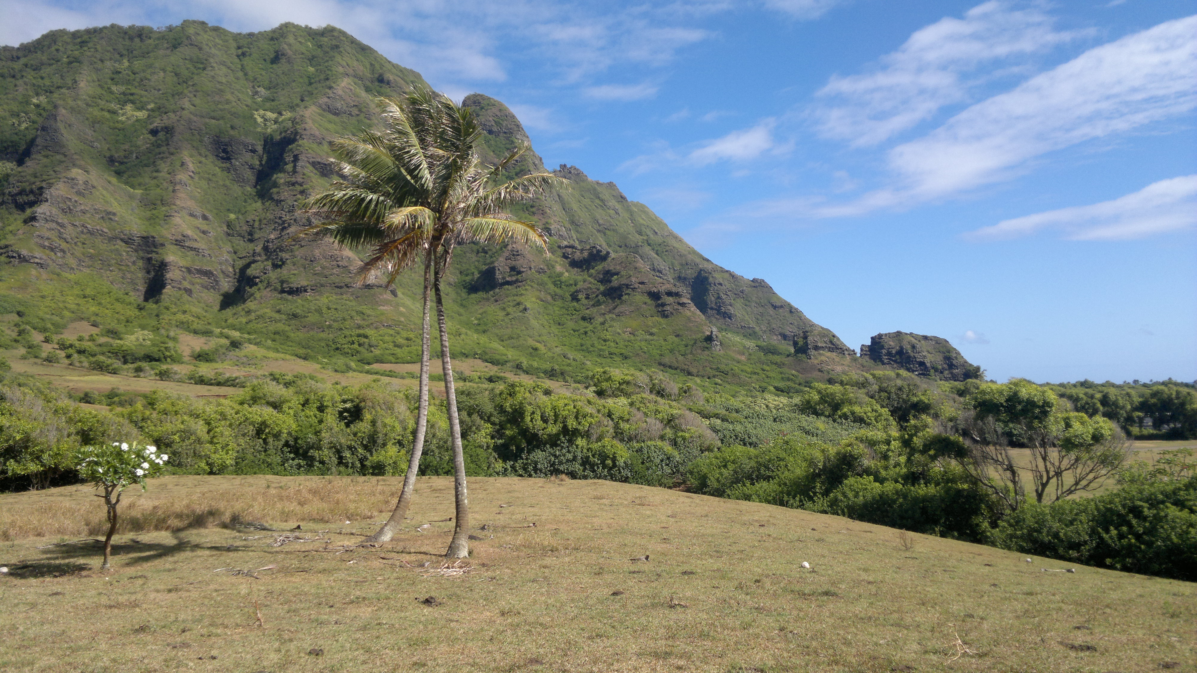 Das Kualoa Tal auf Oahu. Drehort zahlreicher TV- und Kinoproduktionen